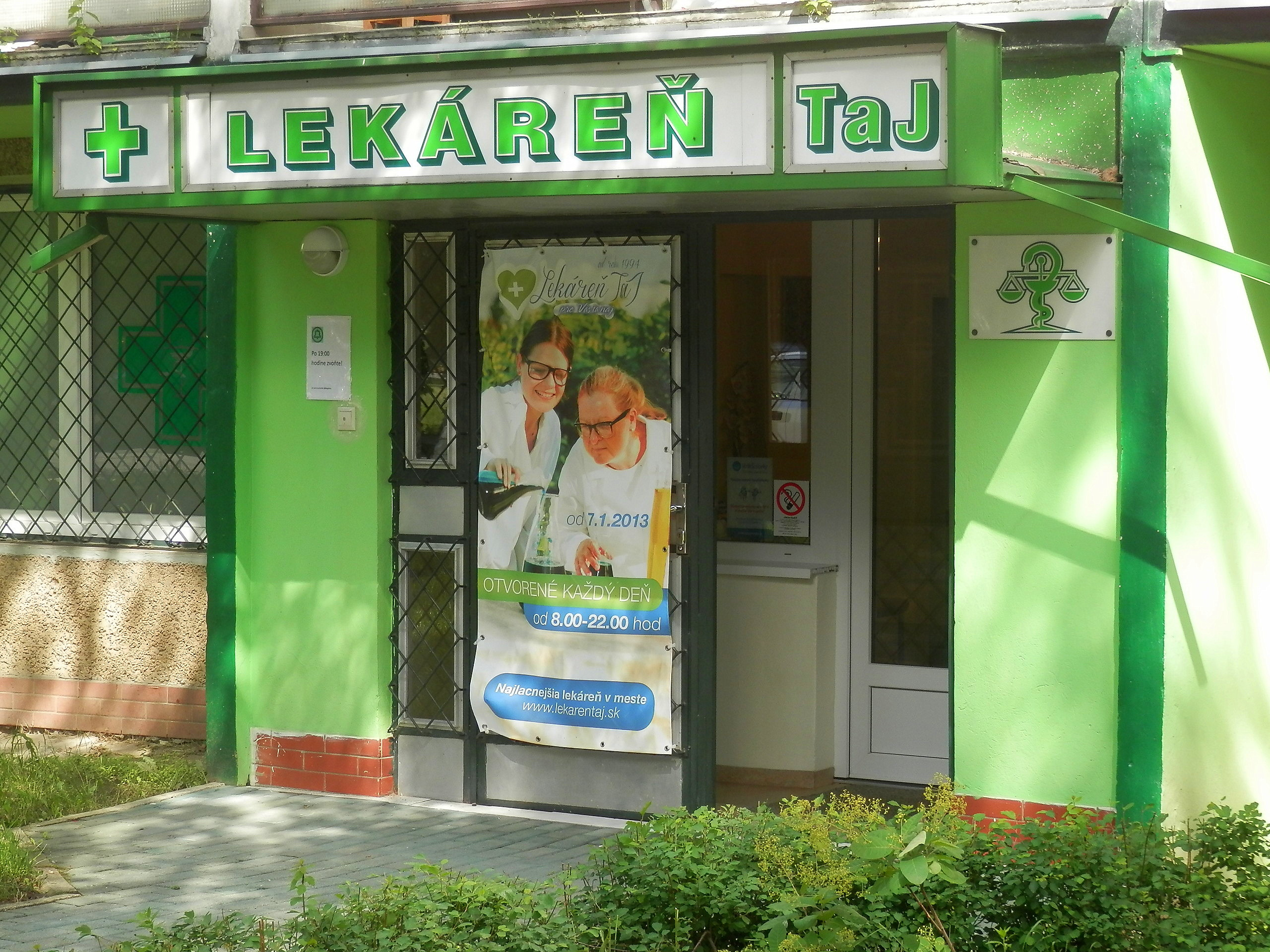 Lekáreň TAJ na sídlisku Sekčov. Ulica armádneho generála Svobodu. Mesto Prešov